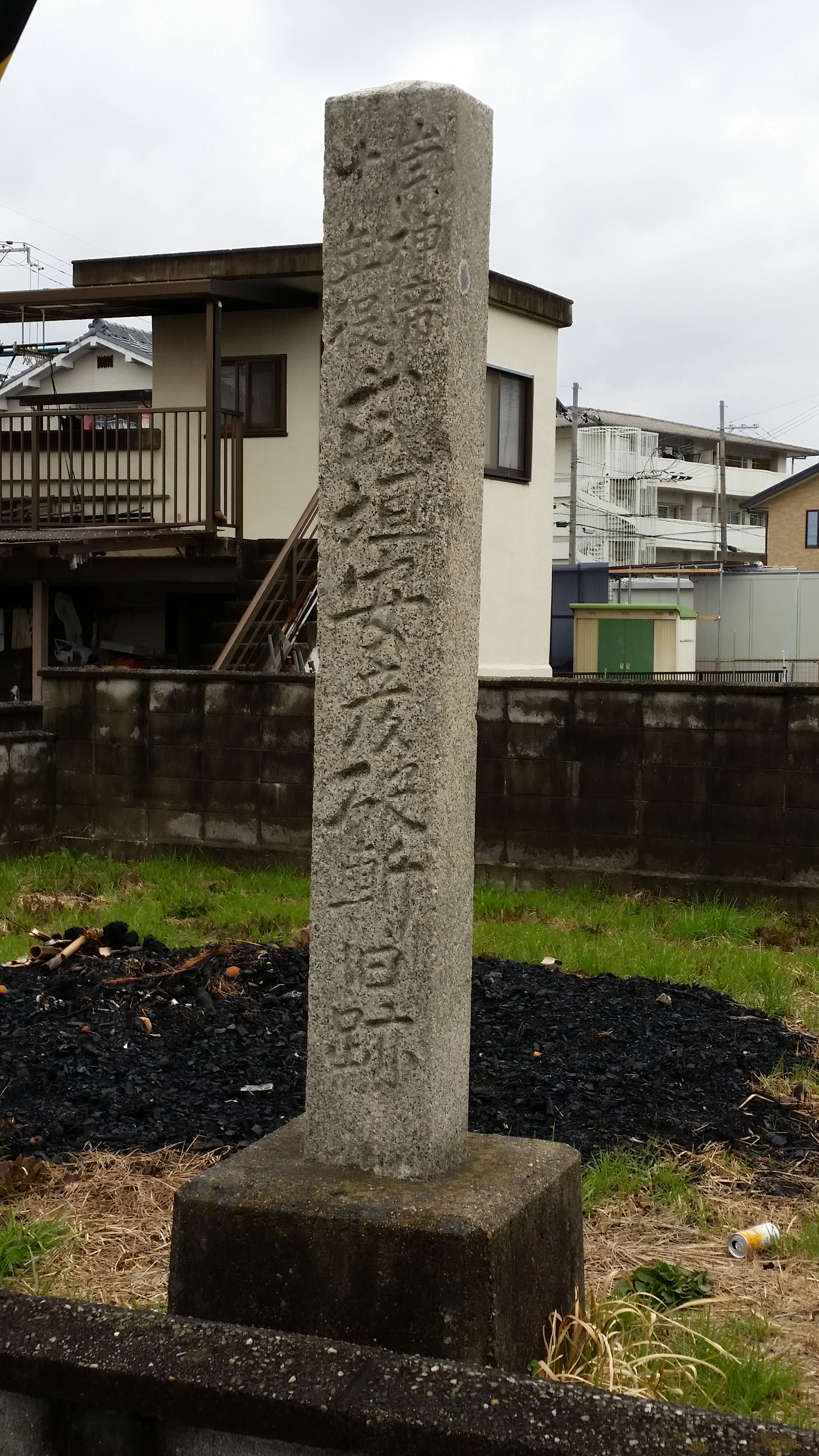 崇神天皇十年の武埴安彦討伐時、刎ねた武埴安彦の首が落ちたところ。いごもり祭で出森送り火焼却が行われる場所。